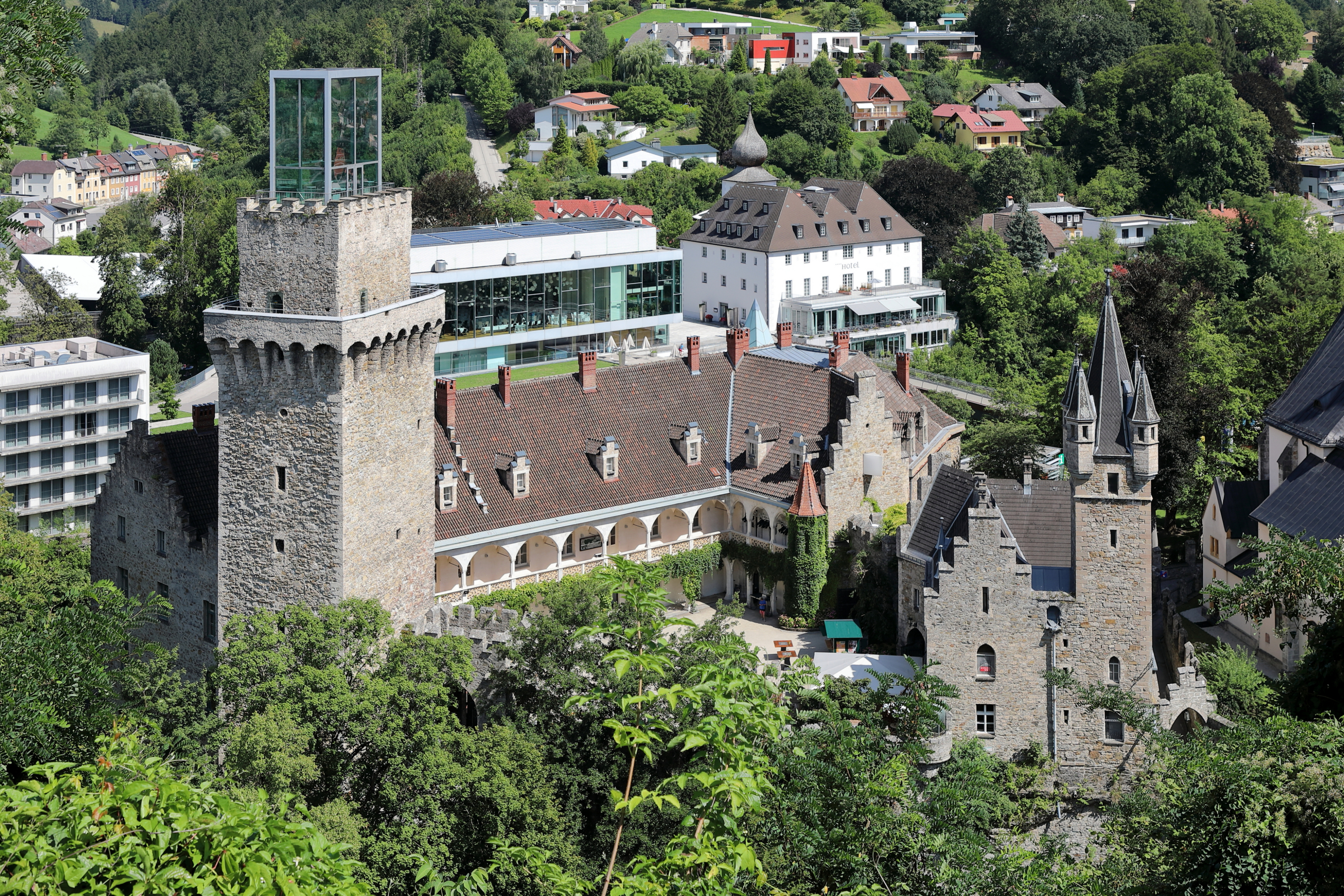 Westansicht des Rothschildschlosses in der niederösterreichischen Stadtgemeinde Waidhofen an der Ybbs.Ursprünglich eine mittelalterliche Burg mit einem Baukern aus der ersten Hälfte des 13. Jahrhunderts baute Albert Salomon Anselm von Rothschild sie ab 1875 zum Sitz der Verwaltung seiner ausgedehnten Güter aus. Im Zuge von Umbauten für die Landesausstellung 2007 wurde von dem Architekten Hans Hollein der hässliche „Glaskobel“ auf dem ehemaligen Burgfried errichtet.